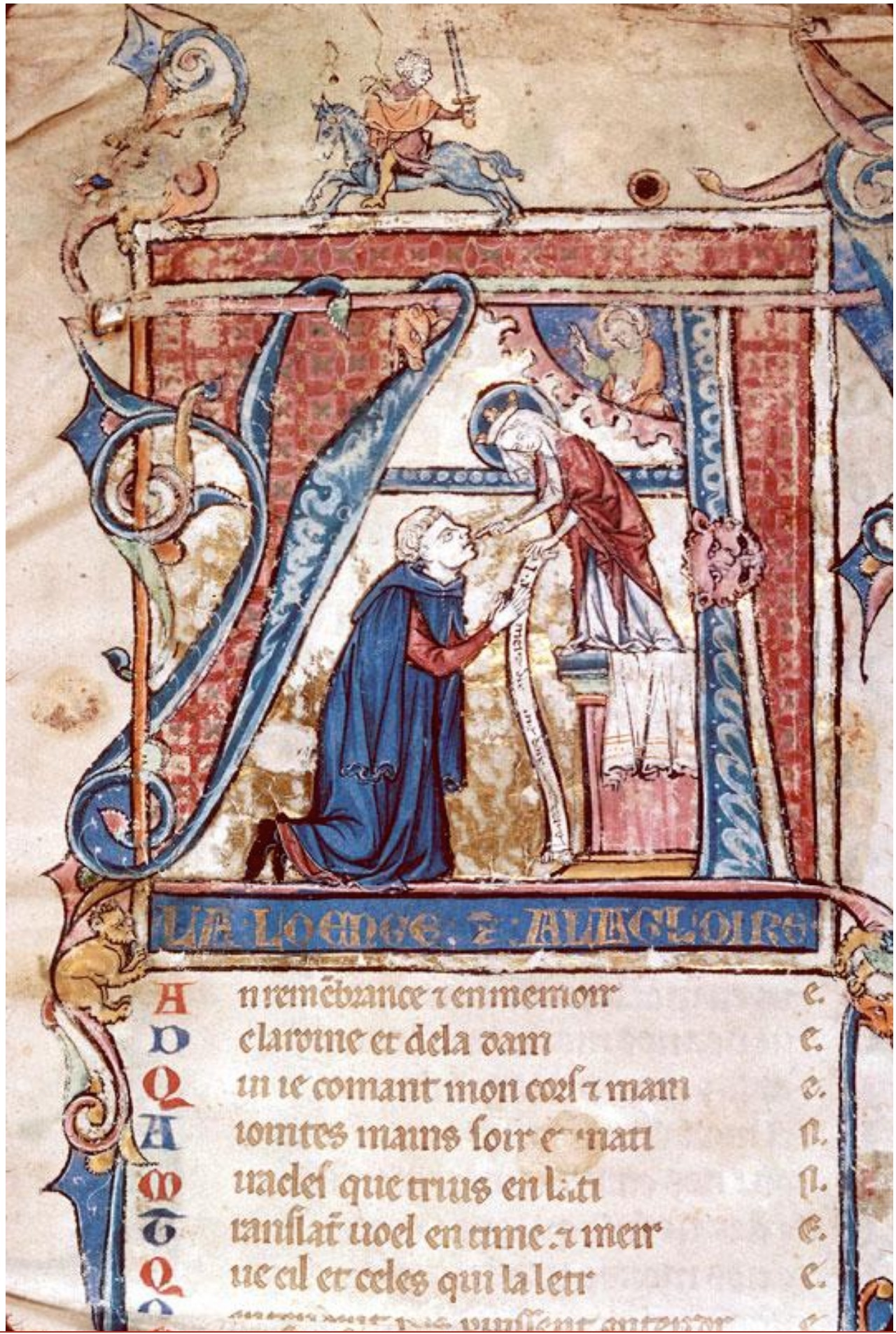 F002v-Chasse à la biche - Autruche